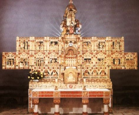 Ołtarz w kościele w Chropaczowie